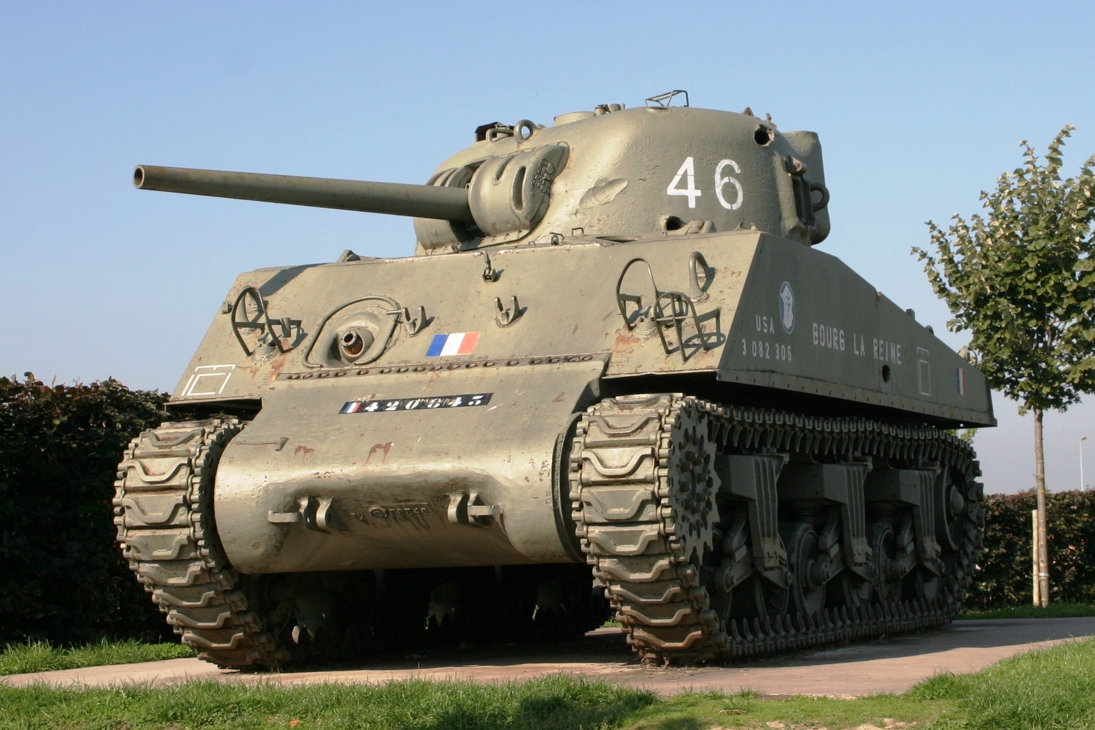 De Sherman Tanks M4 A3 zu Phalsbourg. Kategorie:Tanksen